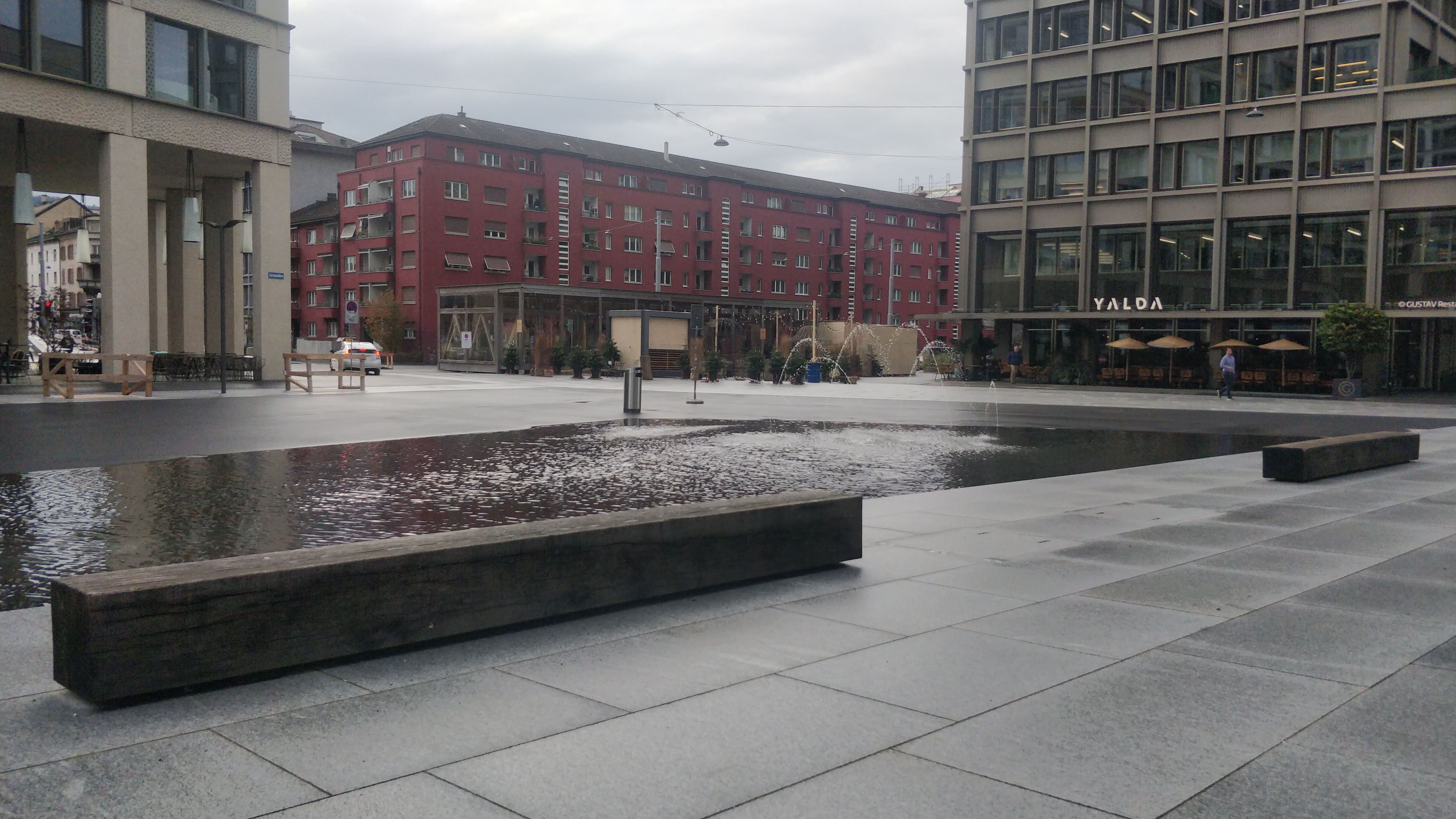 Frontansicht des Europuddles in der Europaallee